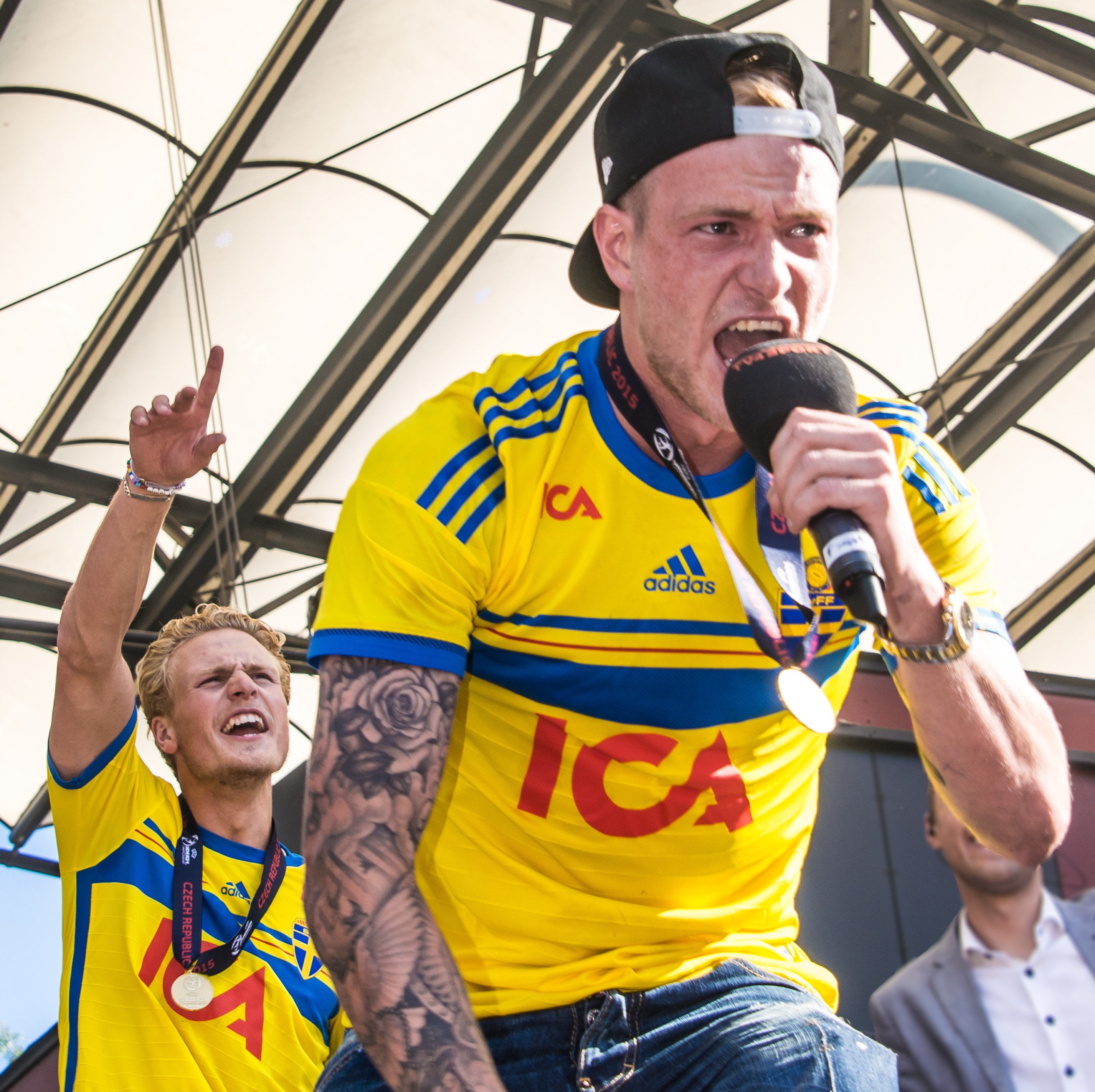 Sveriges U21-landslag blir hyllade i Kungsträdgården i Stockholm den 1 juli av 1000-tals fans efter guldet i U21-Europamästerskapet i fotboll 2015.